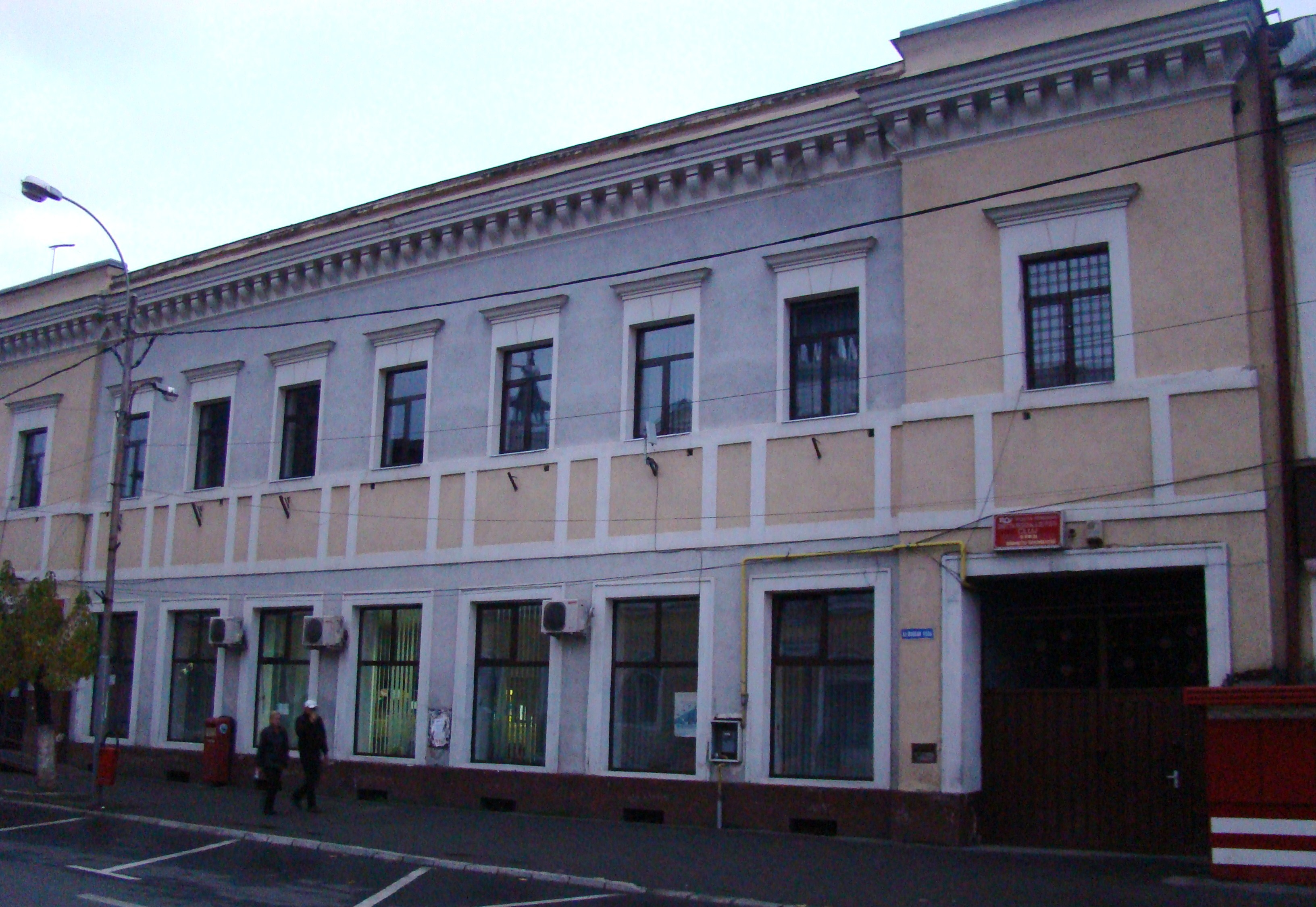 Casă (în prezent Poșta), municipiul Sighetu Marmației, Str. Bogdan Vodă 2